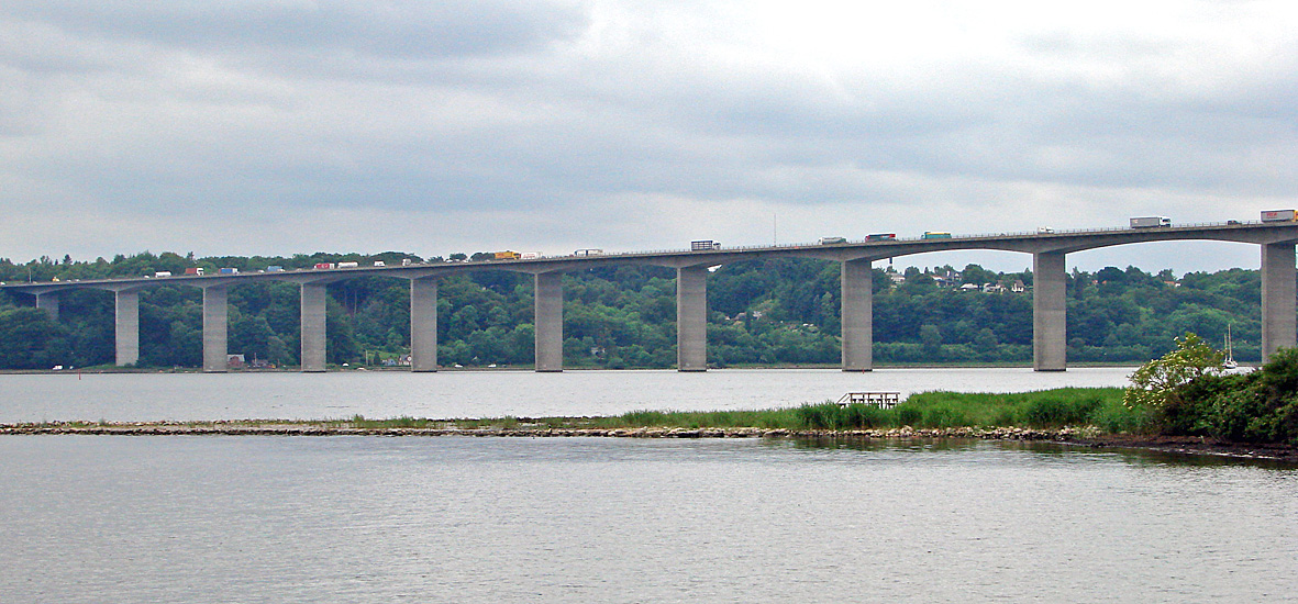 Vejlefjordbroen' set mod vest fra Bredballe på den nordlige side af fjorden